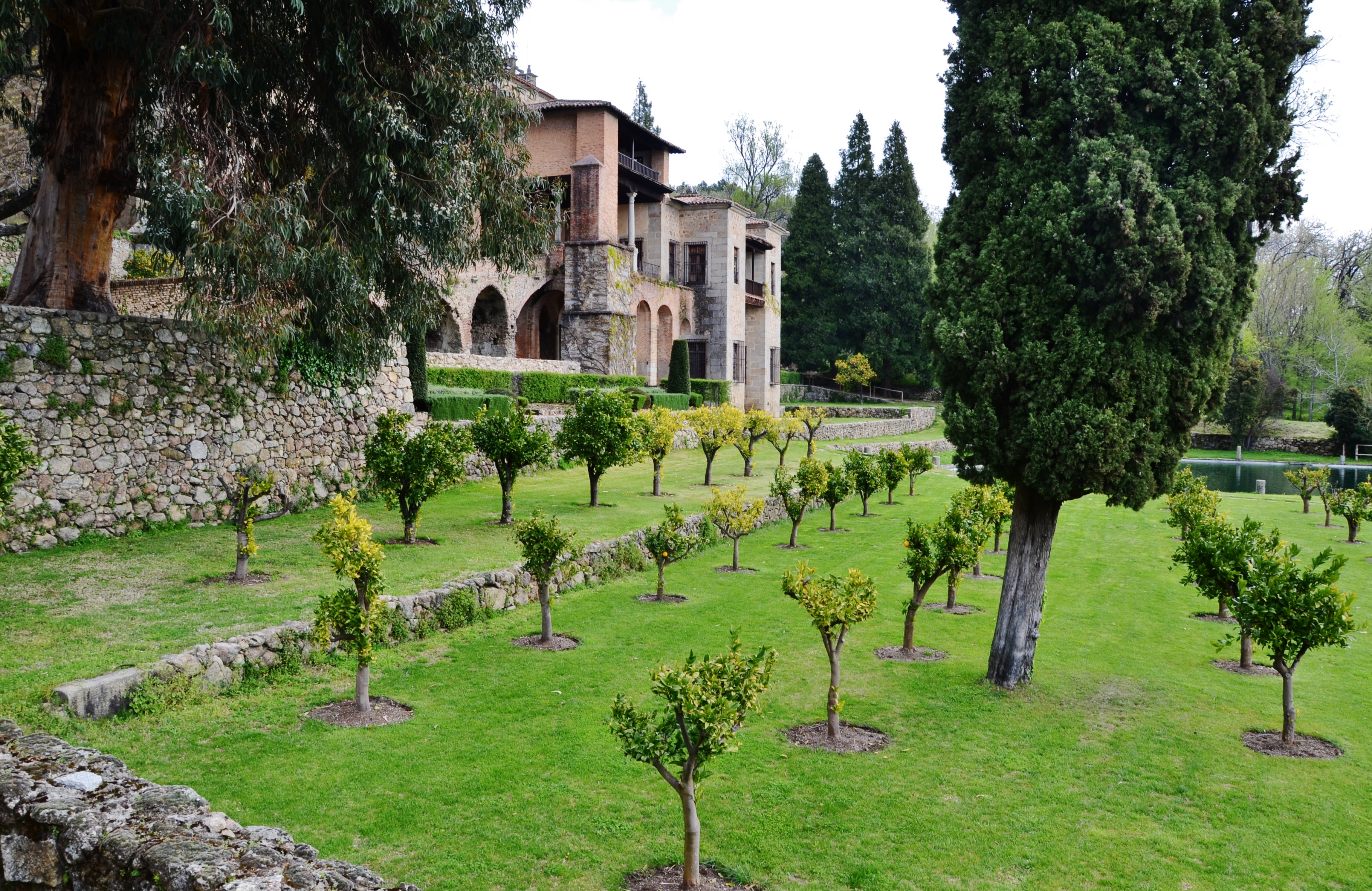 Real Monasterio de San Jeronimo, Yuste, Caceres